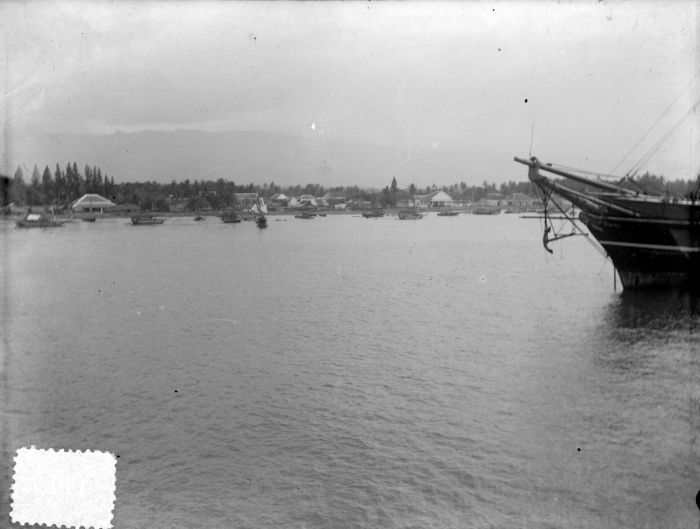 Negatief. Bali (Boeleleng); rechts de boeg van het oorlogsschip Van Speijk, 10 november 1891